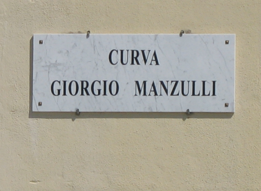 curva crotone, opera propria foto scattata da me